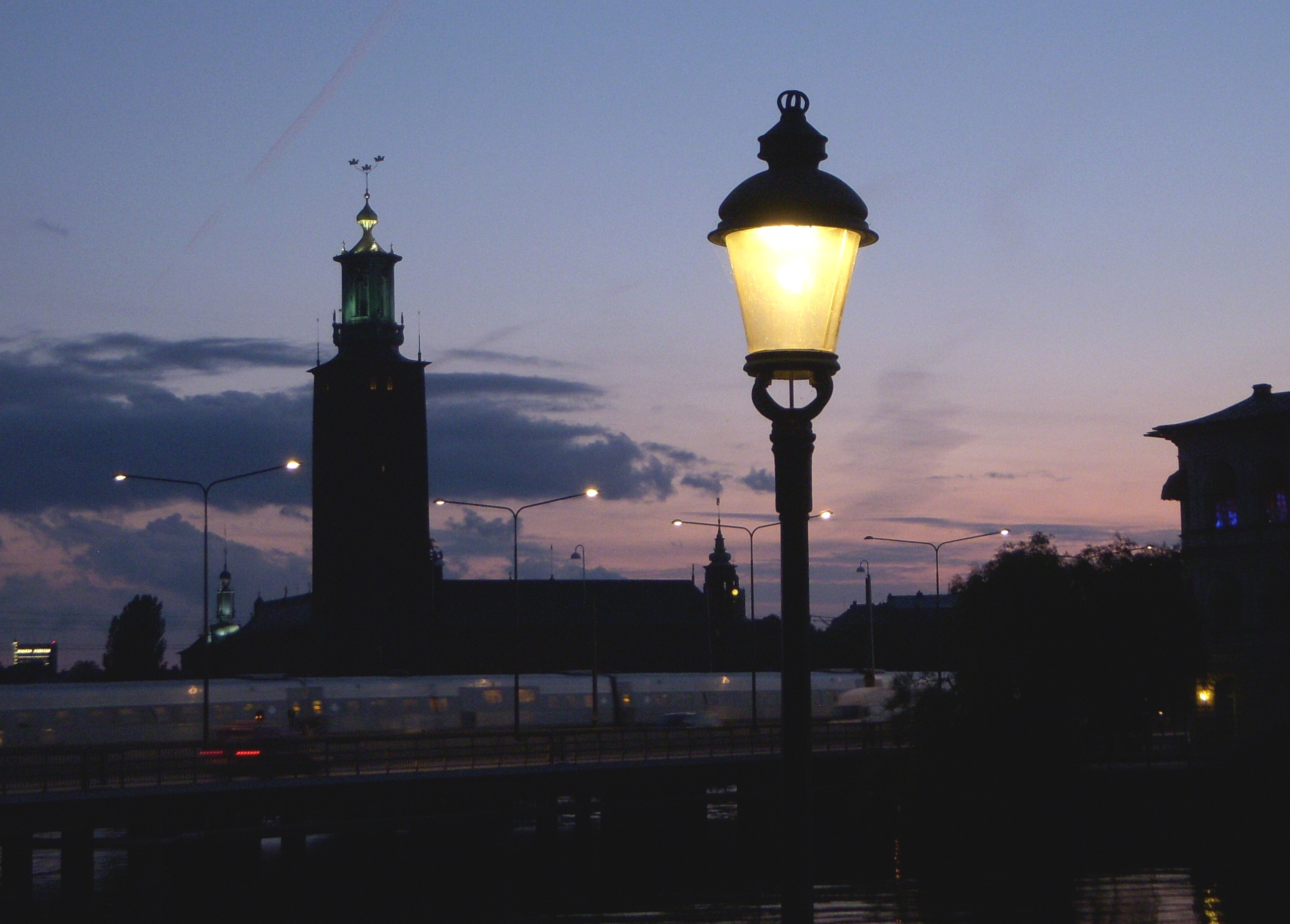 Gatubelysning i Stockholm, armatur "Stockholmslyktan" med Stadshuset i bakgrunden